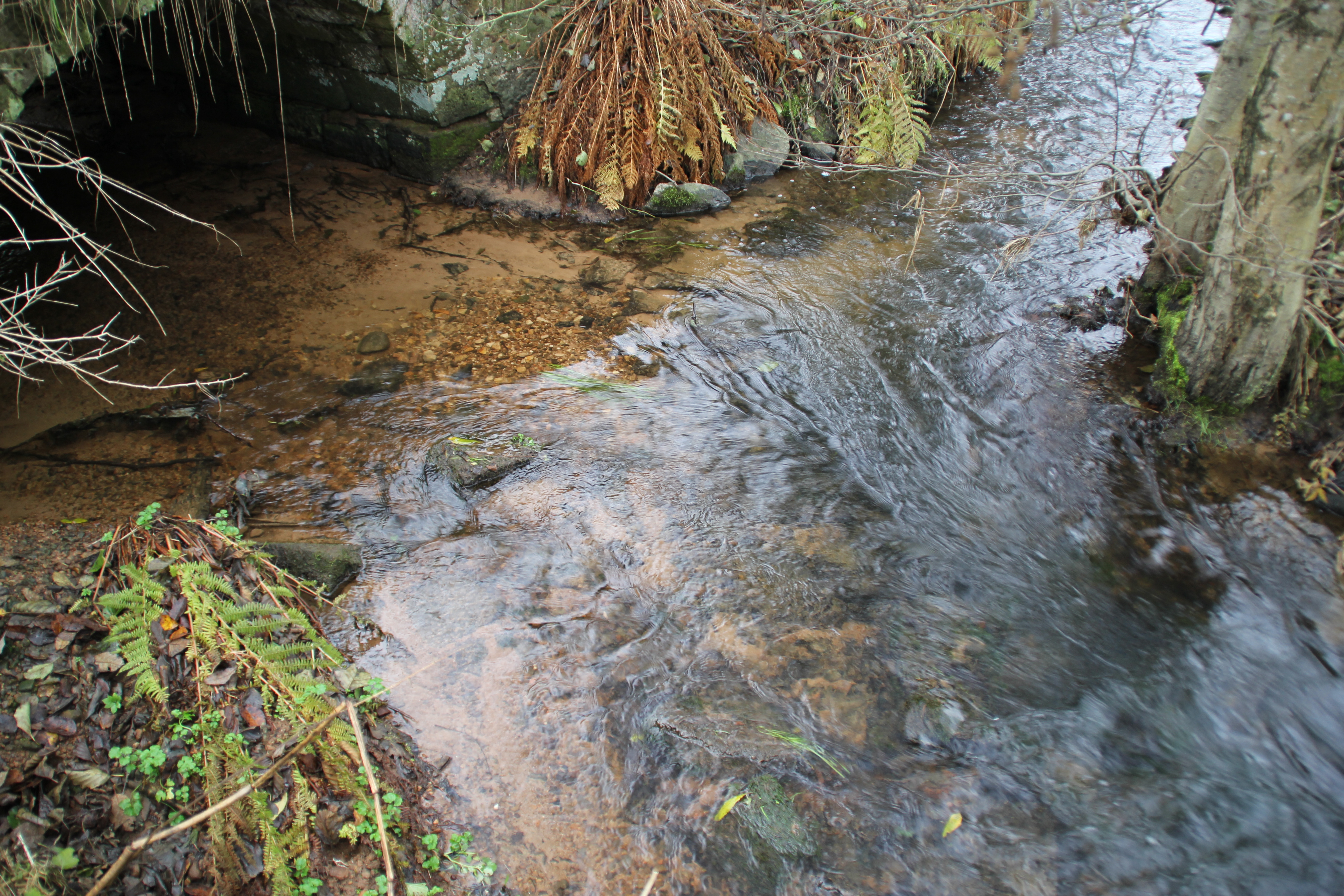 Zusammenfluss von Güttersbach (links) und Streitbach (hinten) zum Marbach (vorne rechts)